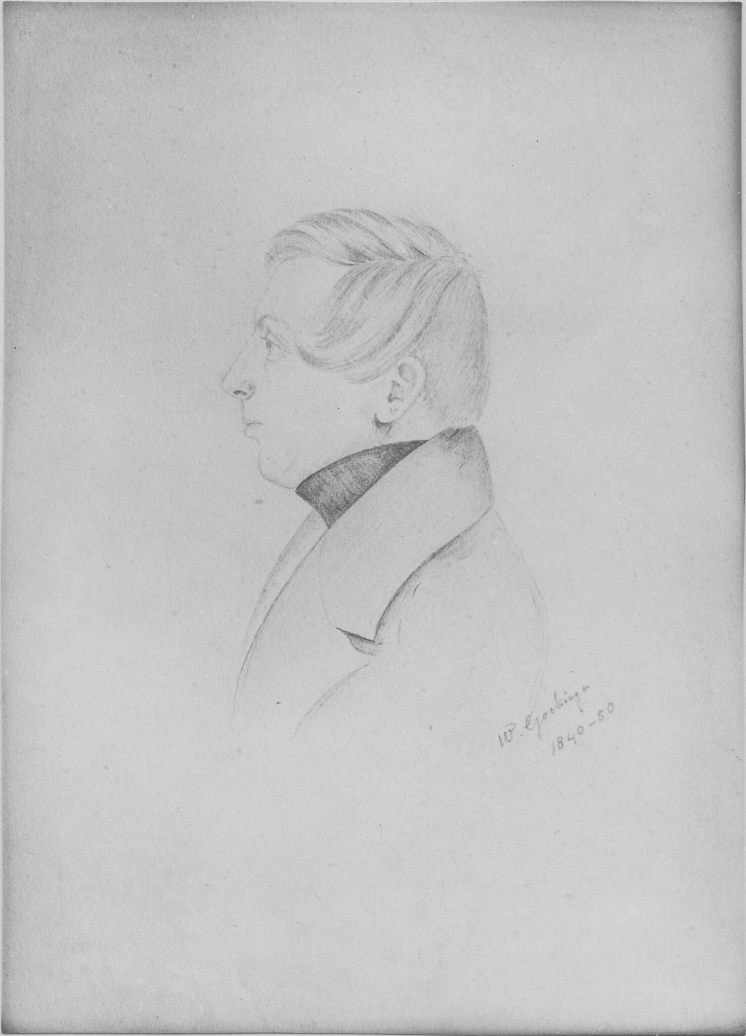 Portret van Hendrik Guichart Abresch, burgemeester van Grijpskerk en Zuidhorn. Foto van reproductie van tekening van Wolter Gockinga.